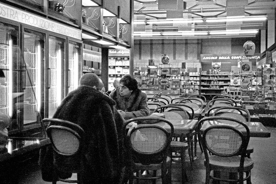 Milano, interno del bar "Motta" in via Battistotti Sassi, annesso alla fabbrica omonima di prodotti dolciari